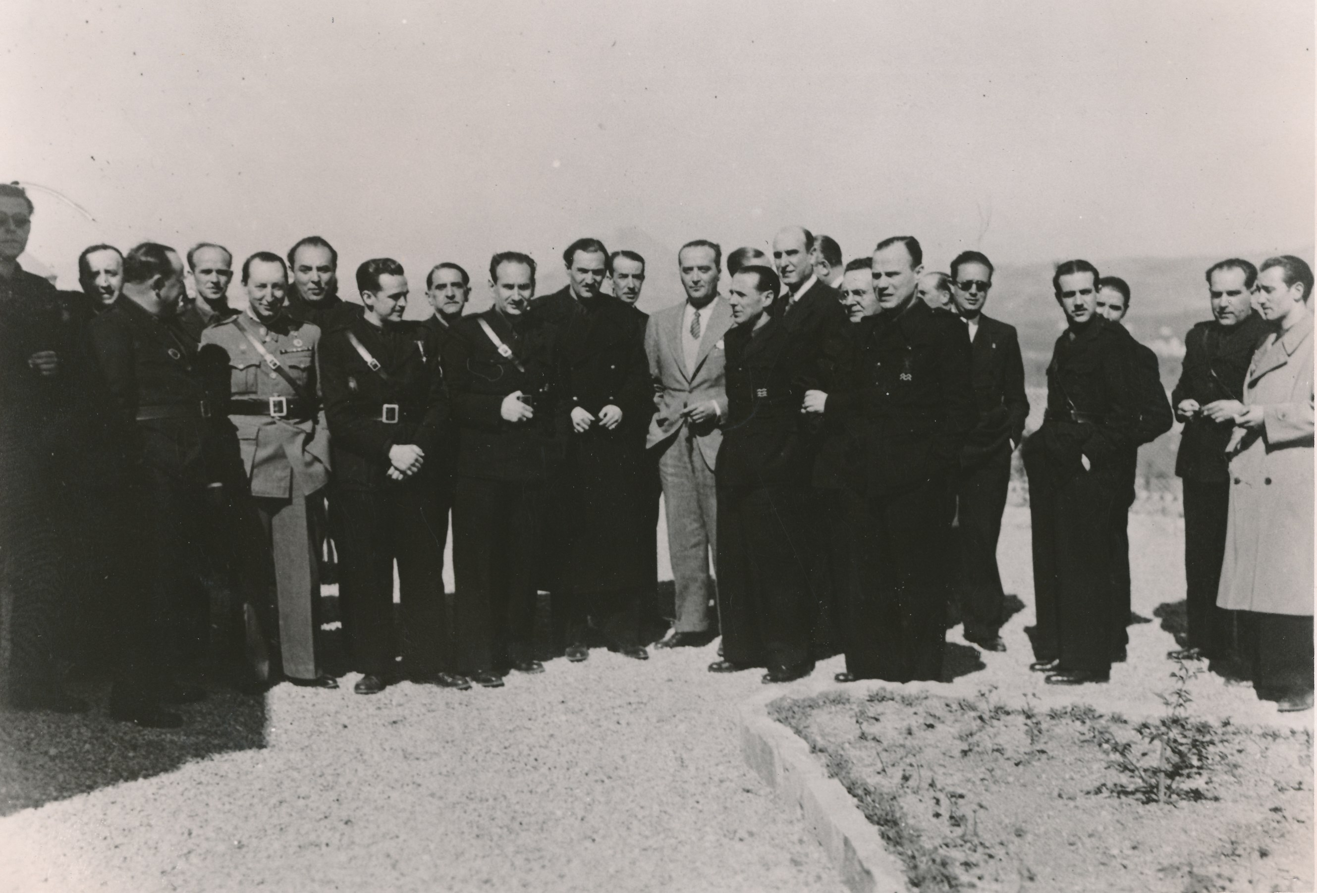 Antequera (Málaga), 1940 Procedencia: Archivo Fotográfico de la Dirección General de Turismo (1951-1992) Fotógrafo: - Registro nº: 00322 Signatura: Caja 4 Fondos: Biblioteca de la Facultad de Empresa y Gestión Pública (Universidad de Zaragoza) Legado: Luis Fernández Fuster / E.S. Turismo Huesca